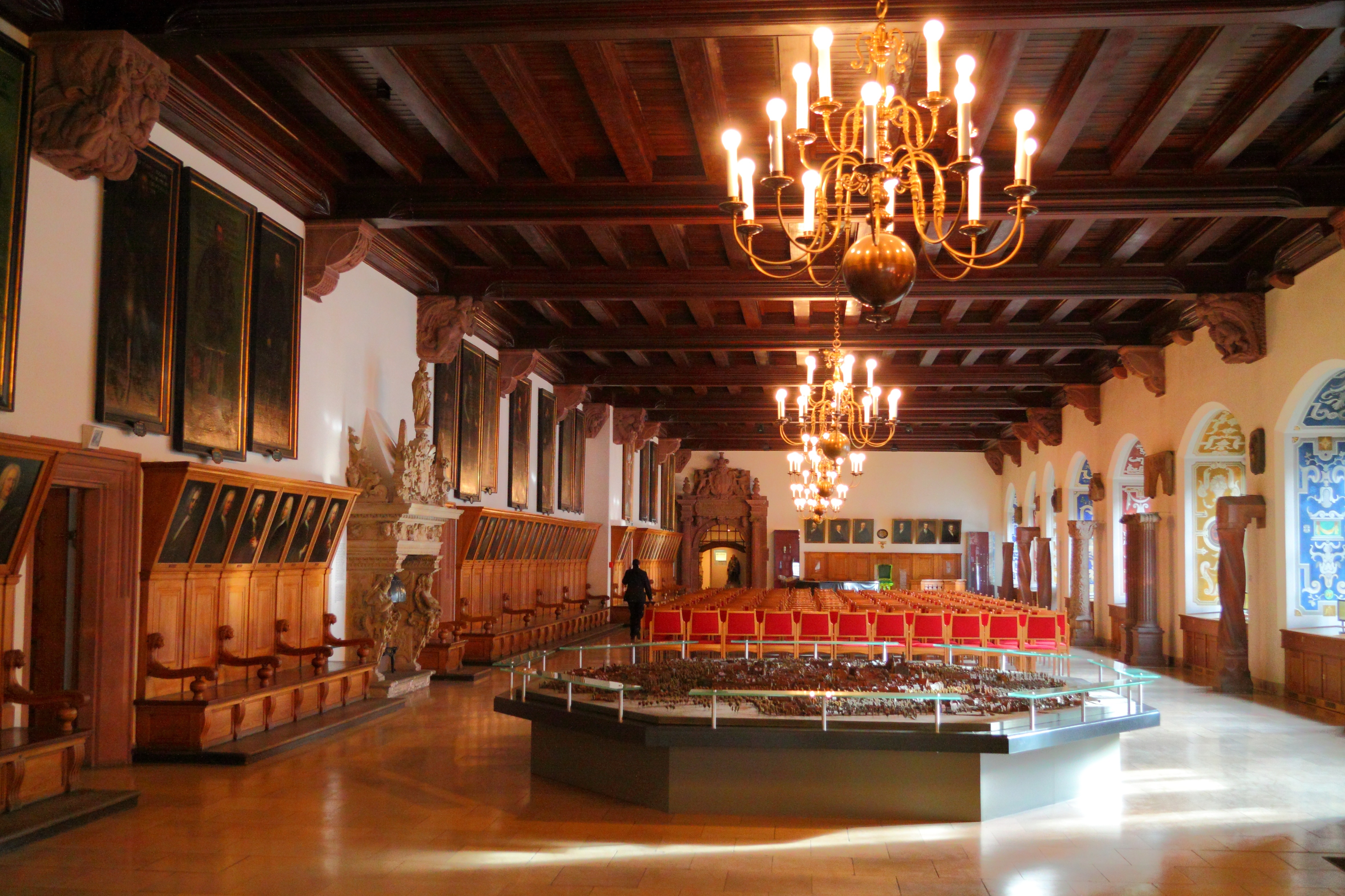 Festsaal mit Stadtmodell im Alten Rathaus Leipzig.